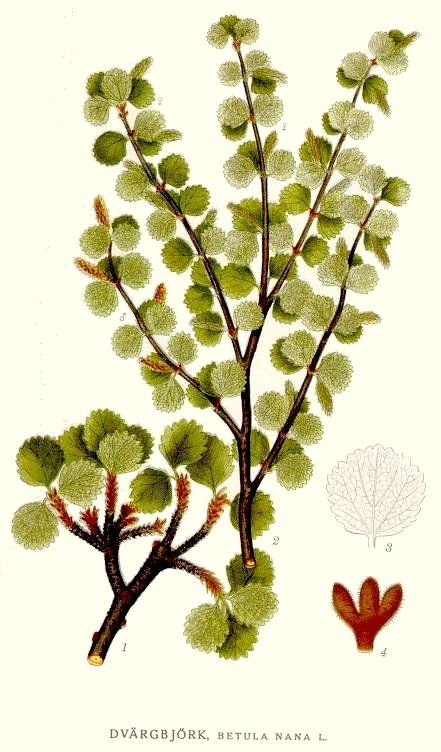 Original Description Dvärgbjörk, Betula nana L.